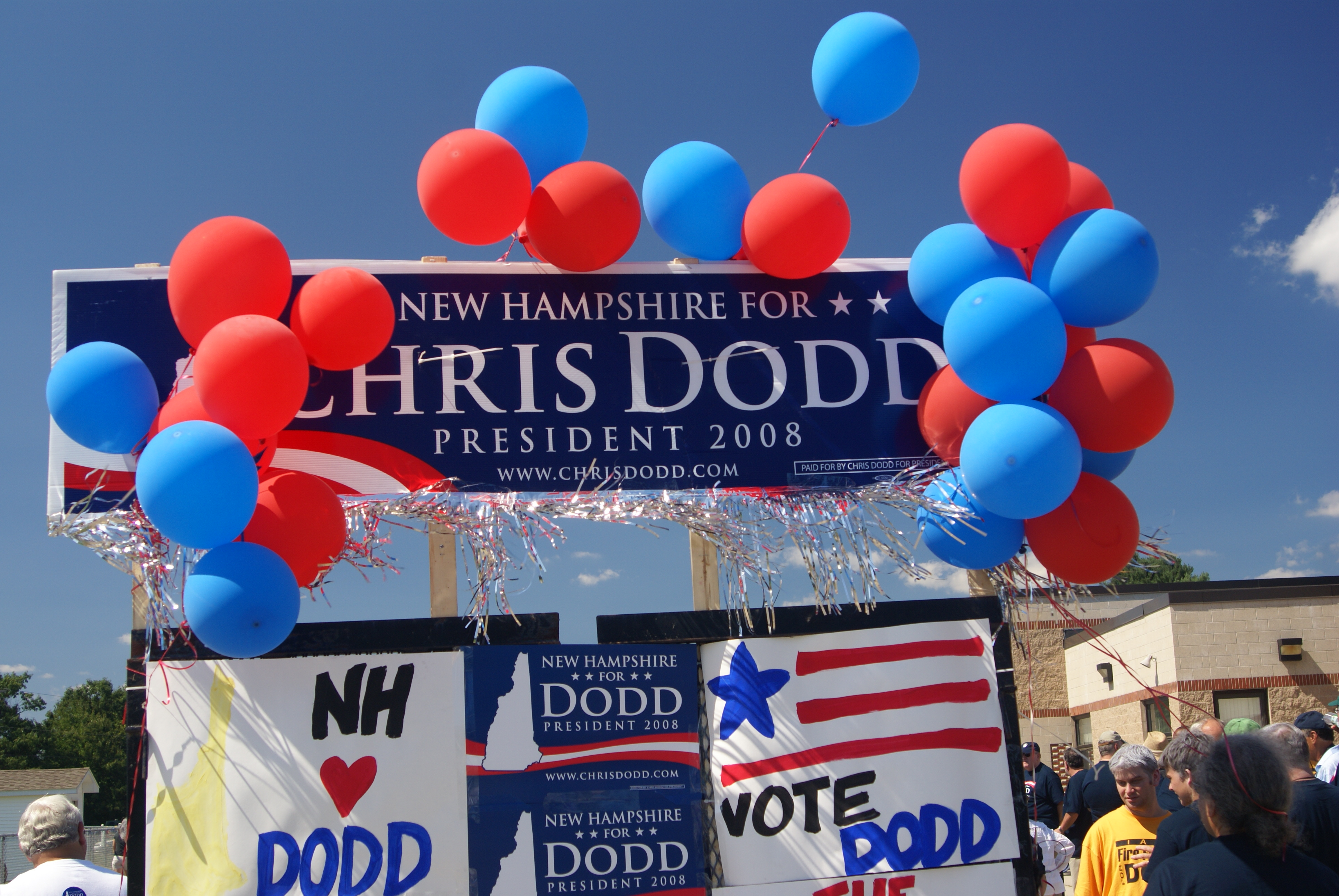 Chris Dodd float